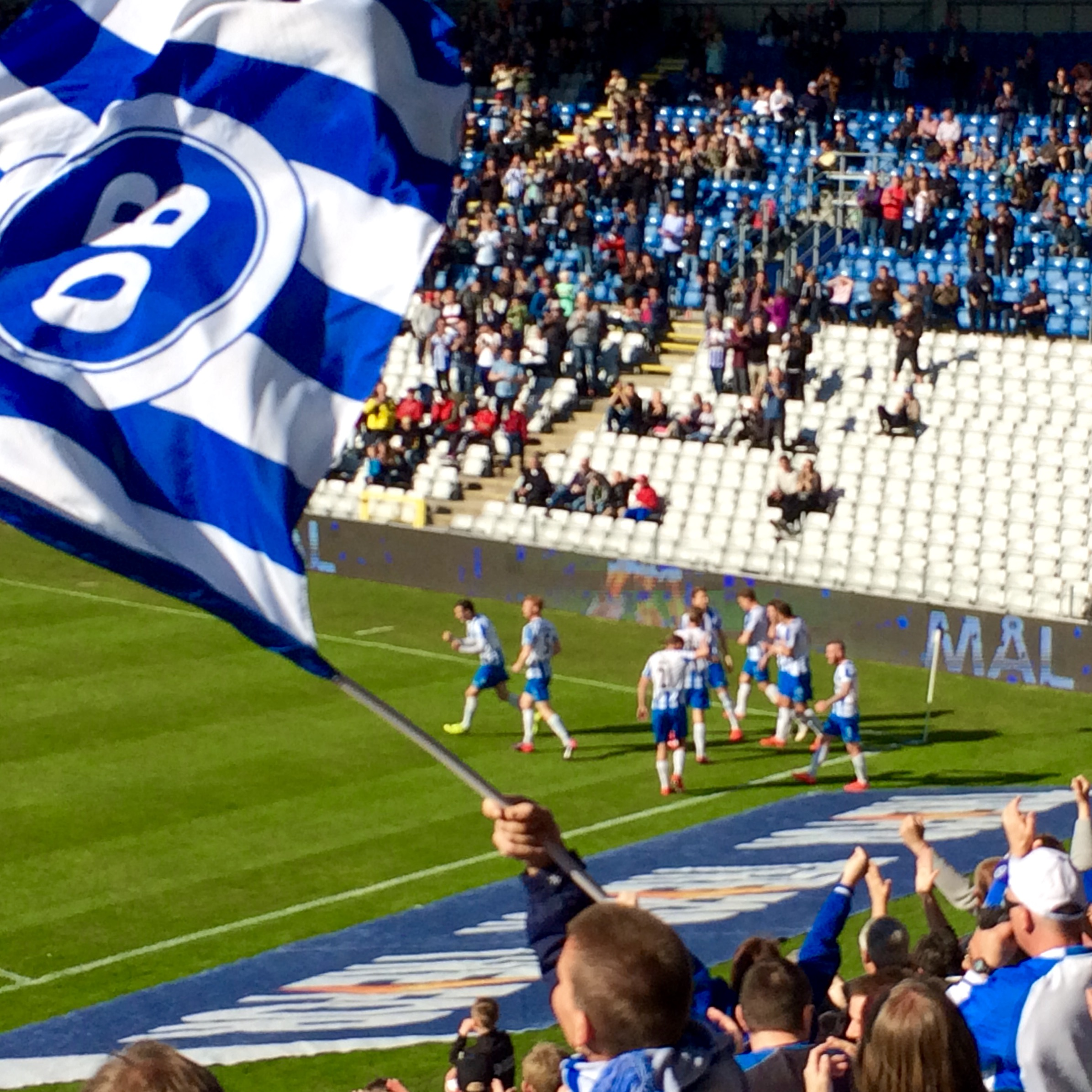 OB fejrer scoring på Odense Stadion maj 2015